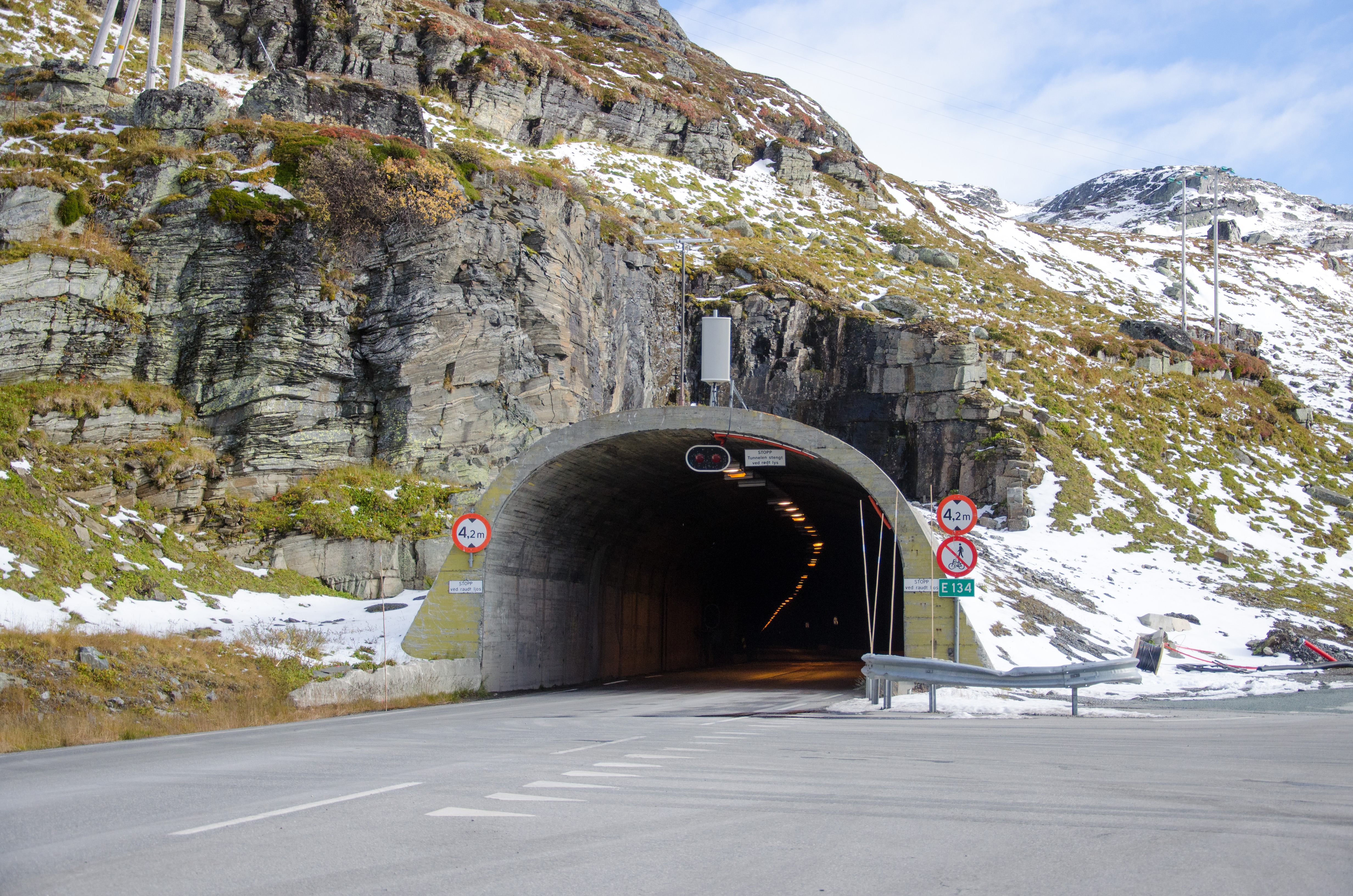 Haukelitunnelen på E134 i Odda kommune